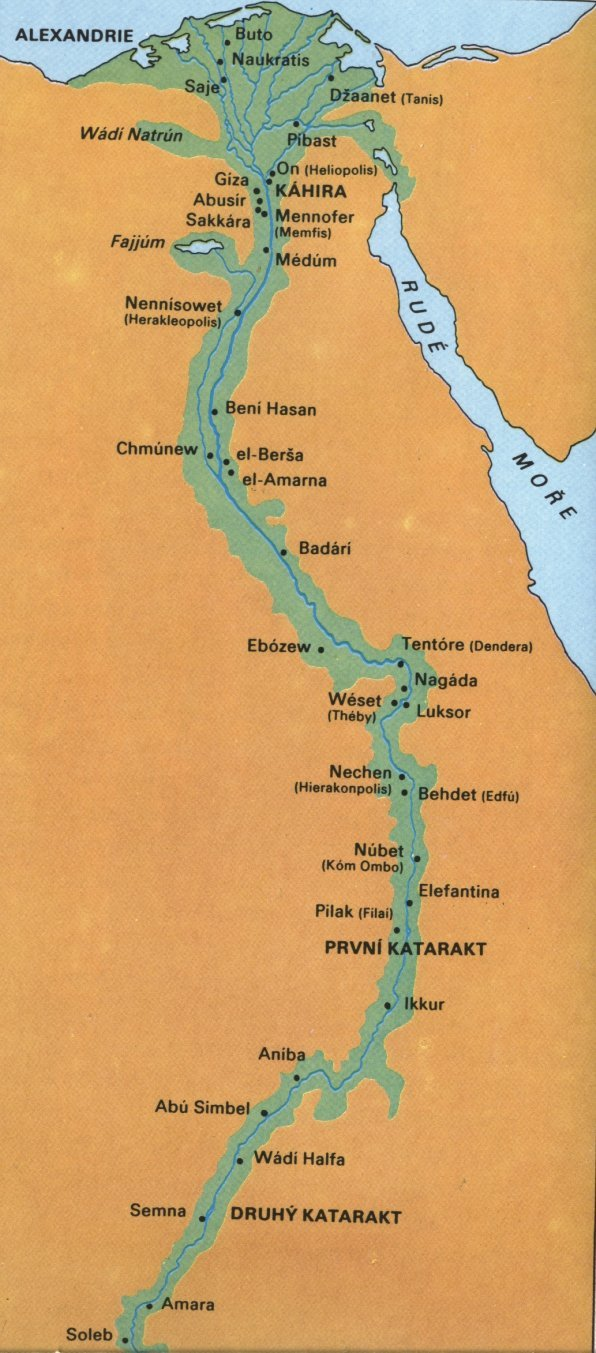 Města starověkého egypta